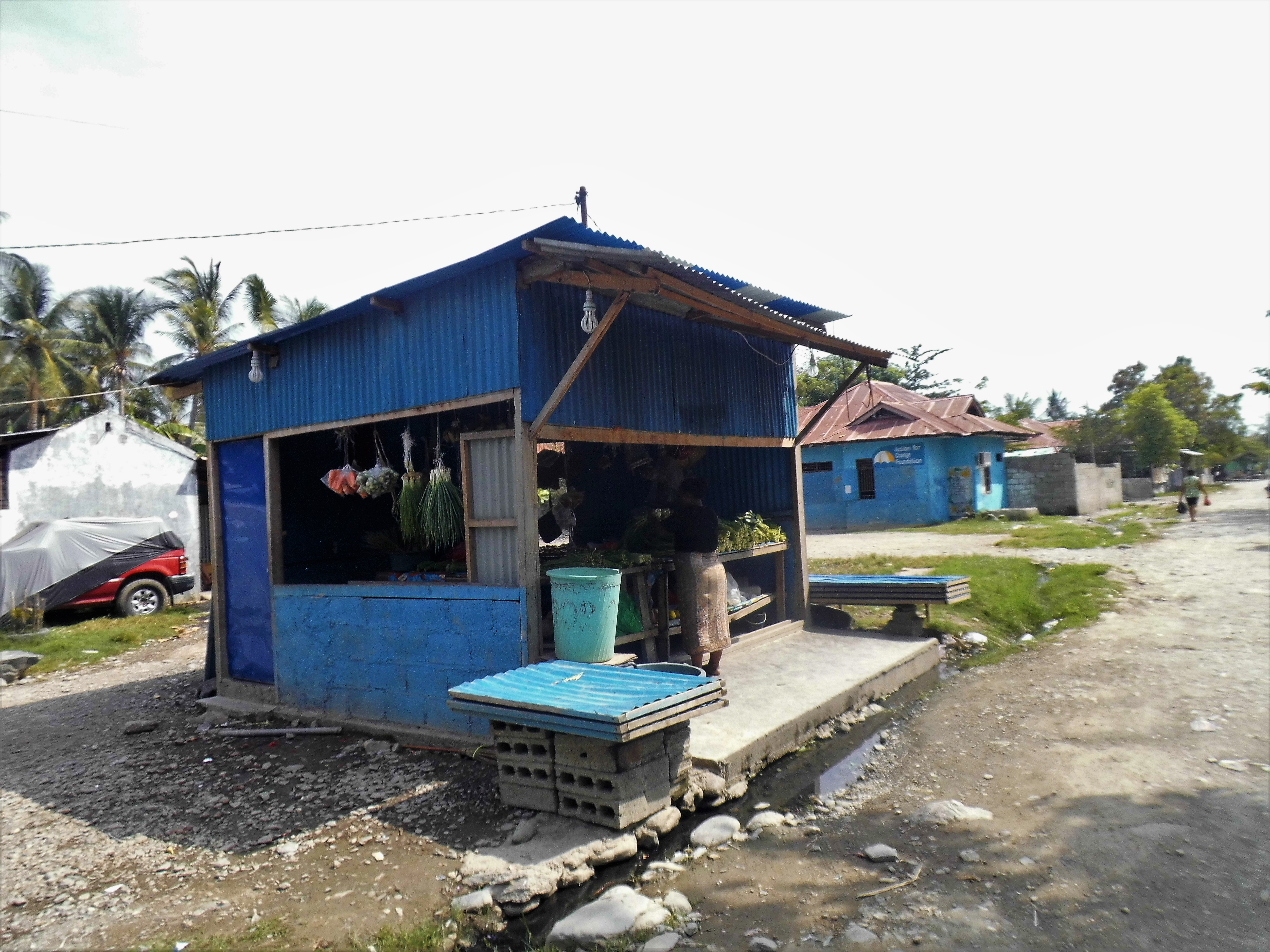 Händlerstand in Kampung Alor